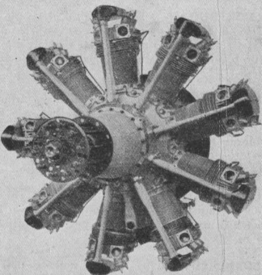 Motore aeronautico a stella